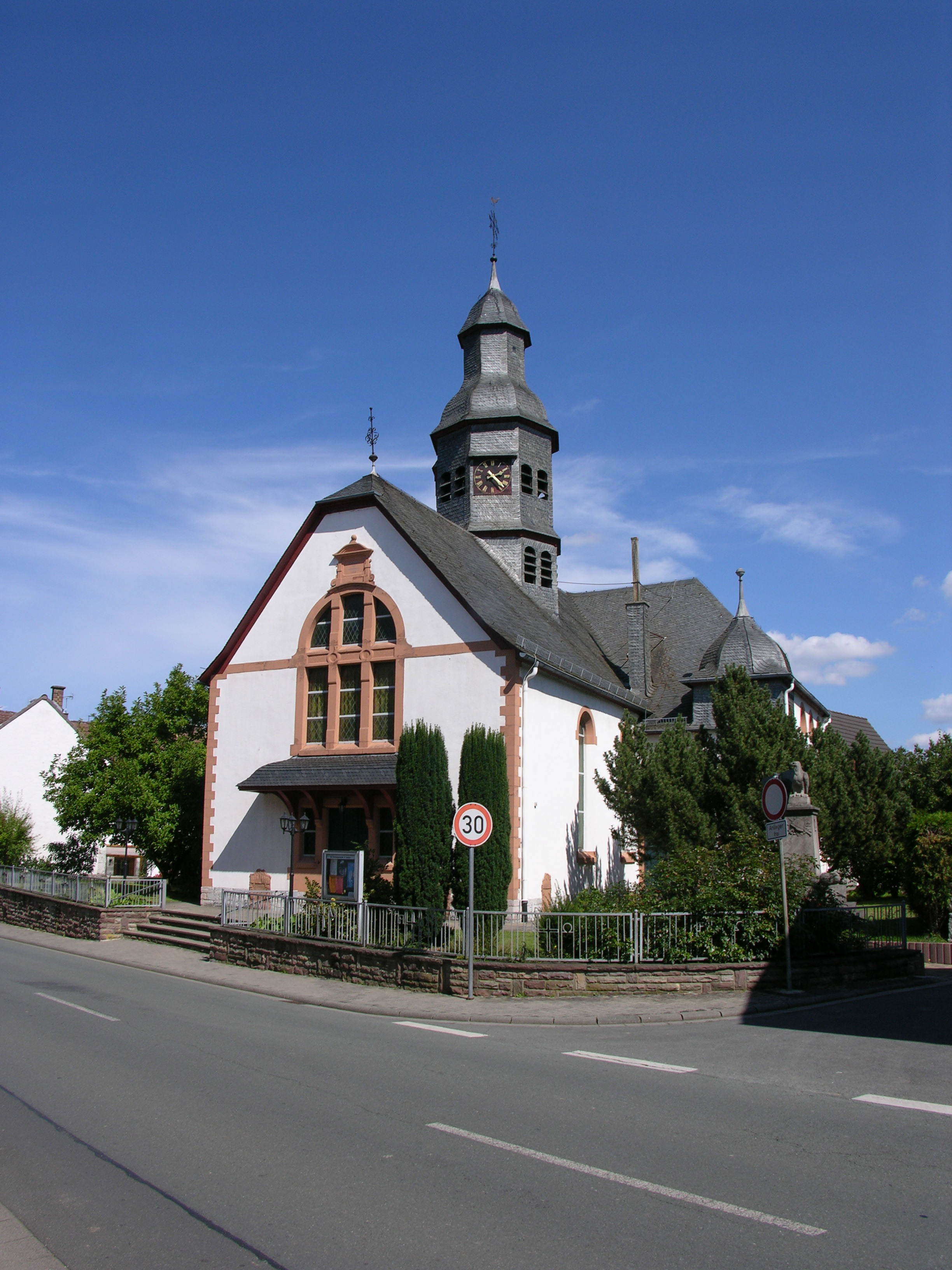 Die evangelische Pfarrkirche von Hochelheim bei Wetzlar (Gemeinde Hüttenberg im Lahn-Dill-Kreis), Wirkungsstätte des Pfarrers Paul Schneider von 1926 bis 1934. Zuvor war sein Vater hier von 1910 bis 1926 Pfarrer gewesen. Auf dem Hochelheimer Friedhof liegen auch seine Eltern begraben.